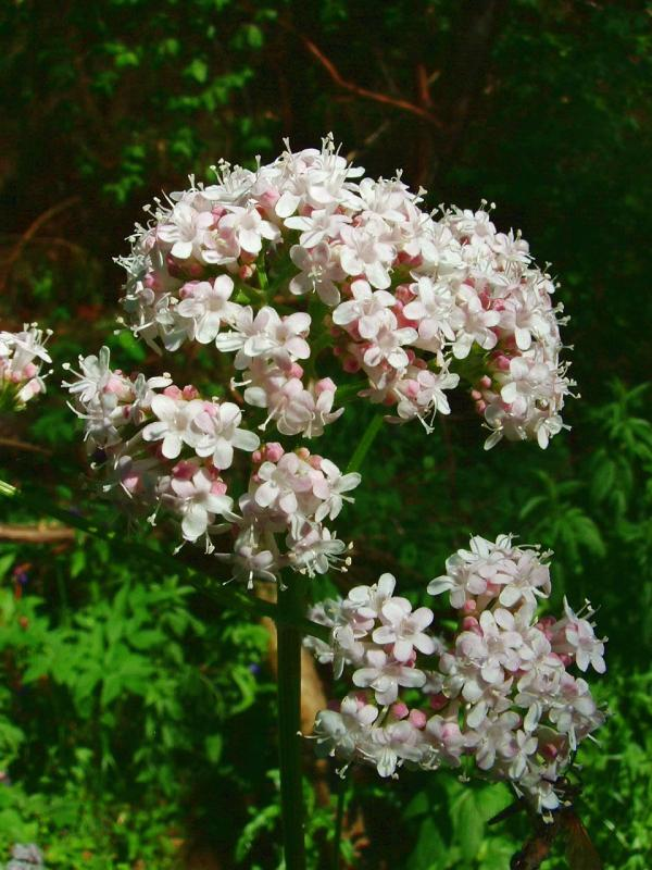 Valériane officinale, photo J.F. Gaffard, Bucy-lès-Gy, juin 2004